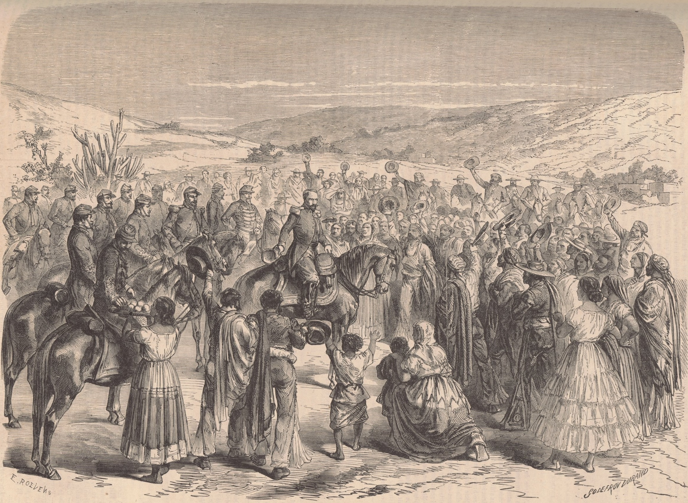 Expédition du Mexique. — La population de Guadalajara se portant au devant du corps du général Bazaine à son entrée dans la ville. (D'après un croquis de M. S. Barbier)